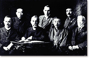 文語新約改訳委員より 左からハリントン、別所梅之助、フォス、デビソン、松山高吉、川添万寿得、ラーネッド（この他に藤井寅一がいた） 1917（大正6）年10月5日、大正改訳 新約聖書を完成、出版した。